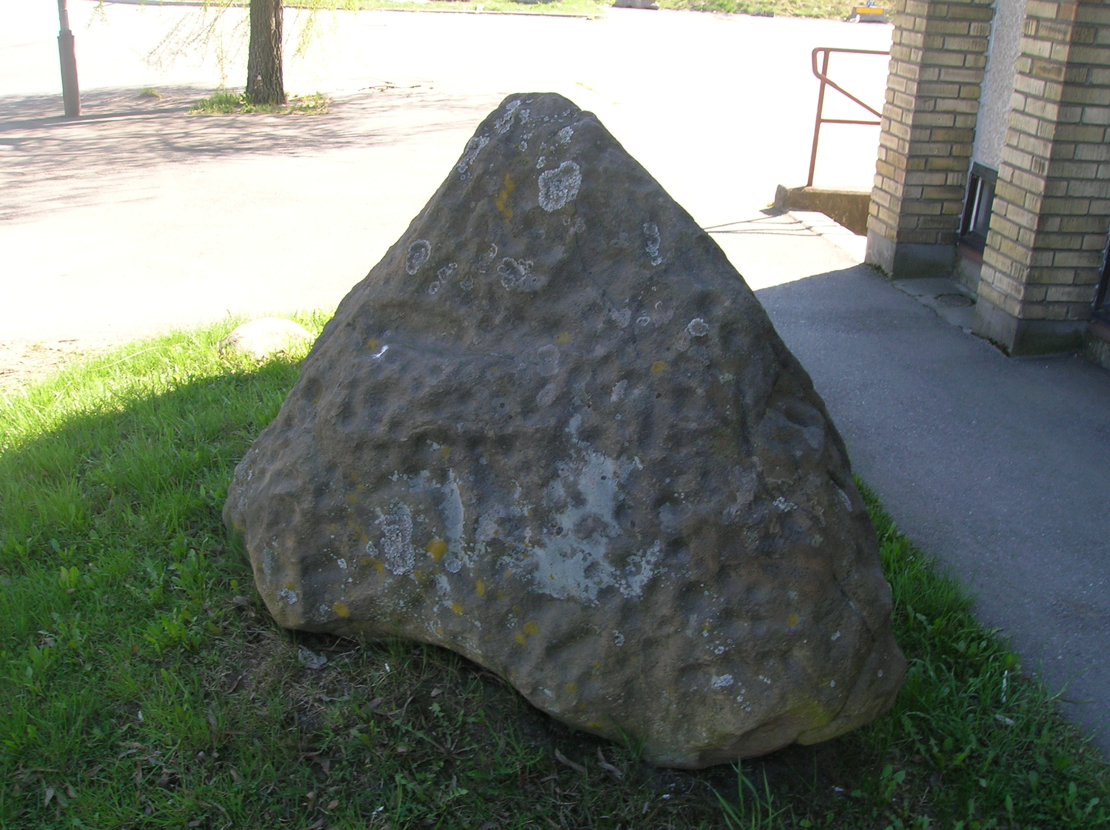 Skålgropssten, 1,3 x 0.8 m stor och 1,5 meter hög, 300 inhuggna gropar, Brännkyrka RAÄ222 Uppställd vid Brunnbyvägen 20 i Östberga, Stockholms kommun. Stenen är täckt av över 300 gropar.